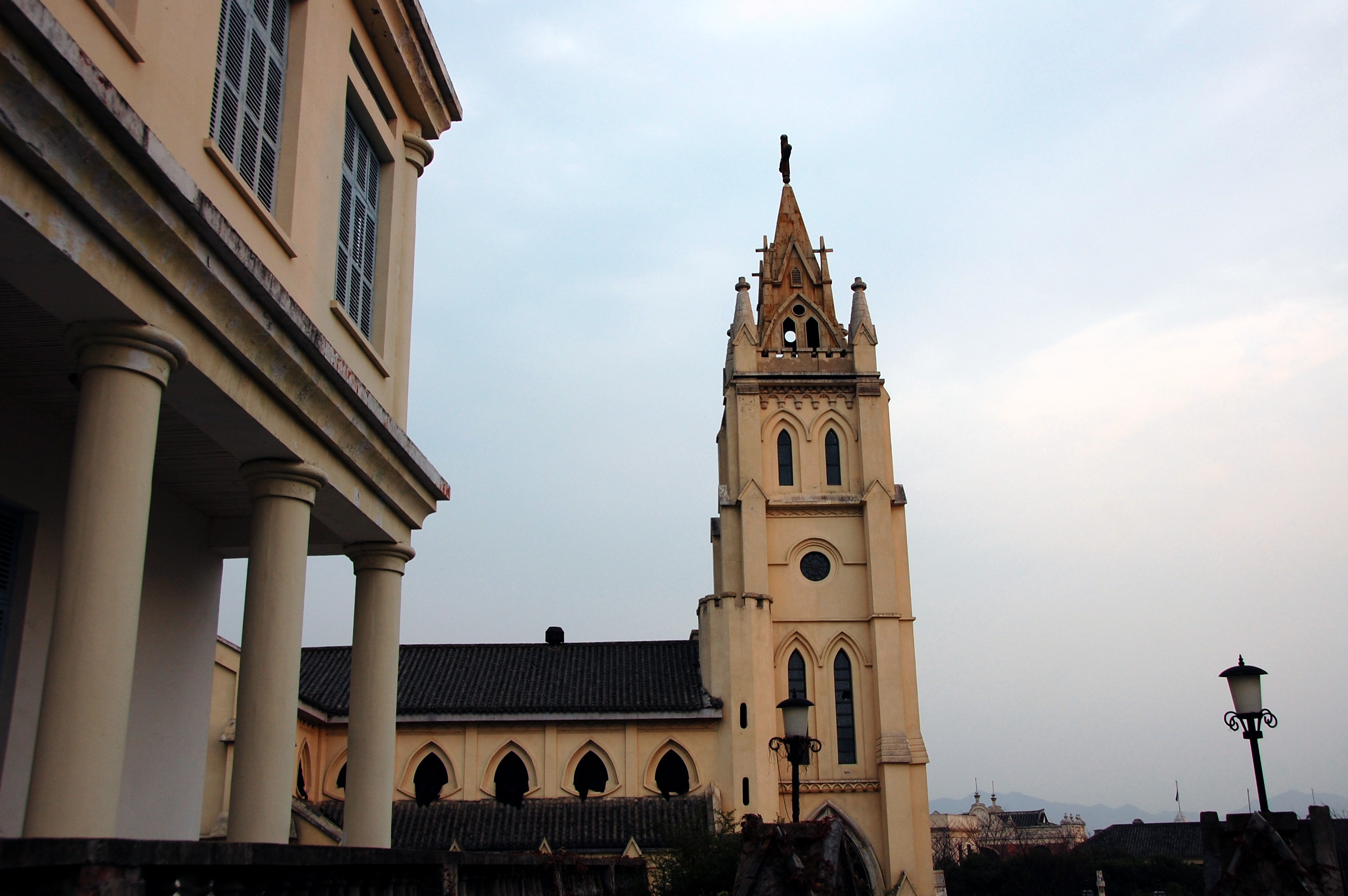 ???????/Guangzhou Hongkong Street/???????